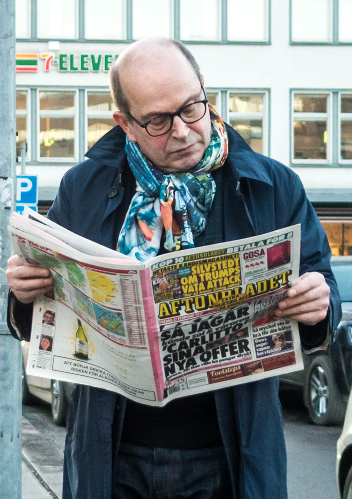 Jan Scherman med Aftonbladet den 18 februari 2017 i Stockholm.